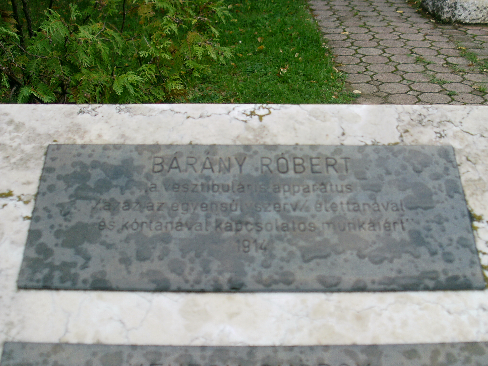 Bárány Róbert emléktáblála Egerben